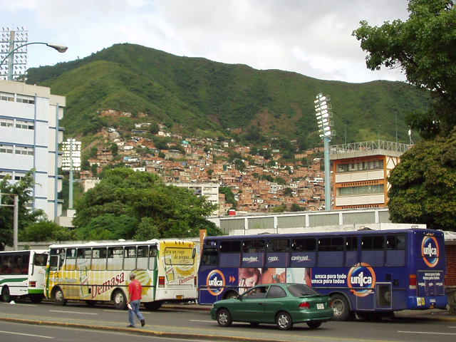 La Vega. Caracas, Venezuela.